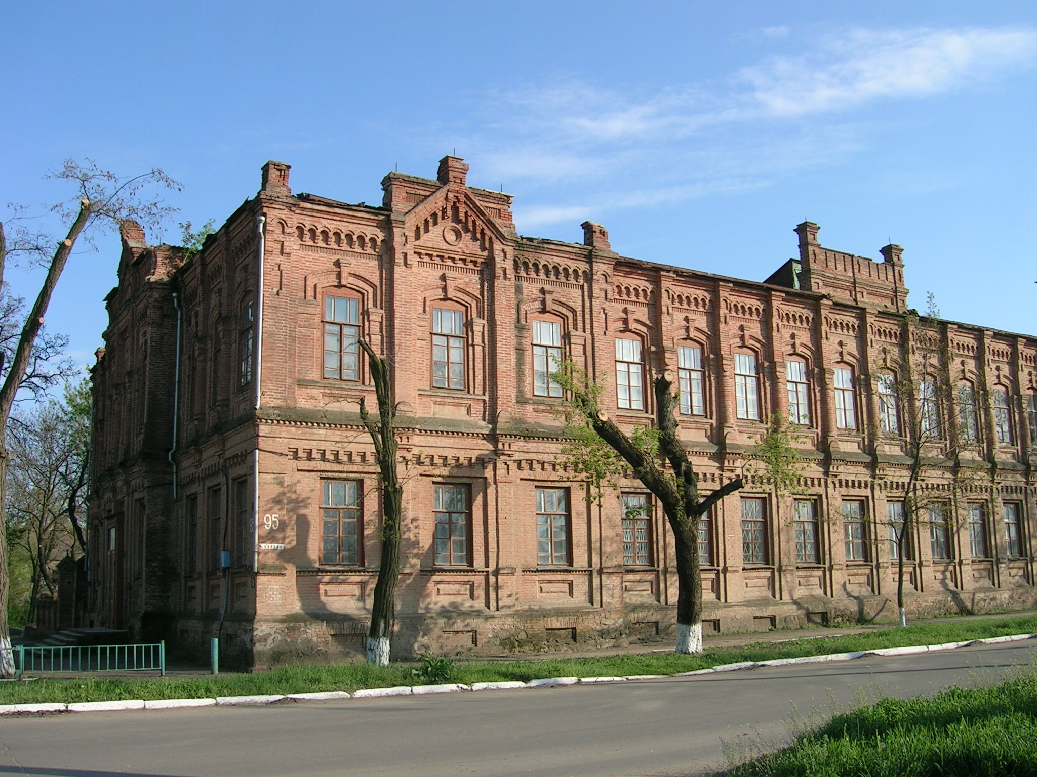 Жіноча гімназія (кін. XIX - поч. XX ст.)